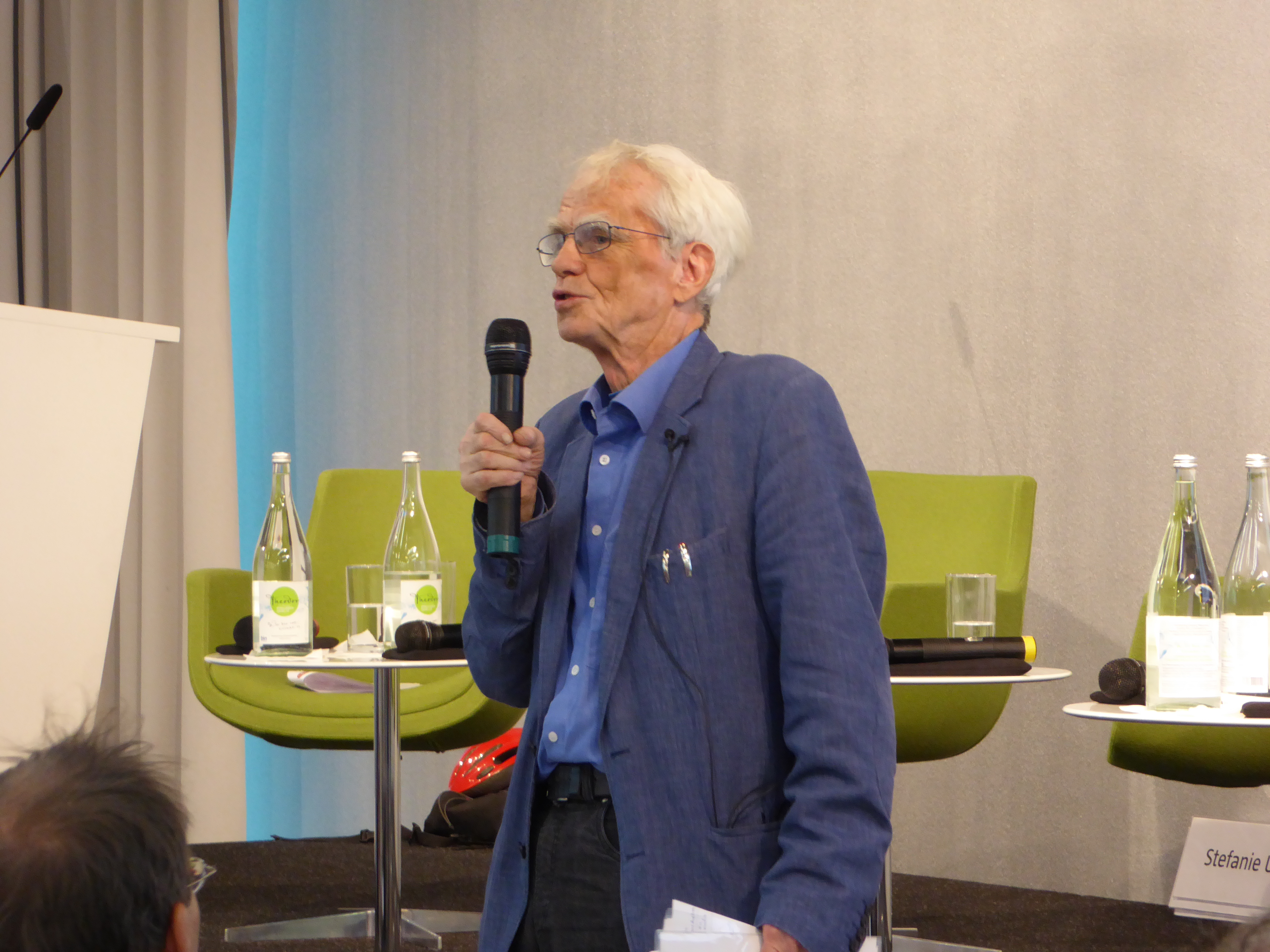 Hans-Christian Ströbele erinnert im Rahmen der Generalversammlung der taz-Genossenschaft am 18.09.2016 an die Gründungsphase der Genossenschaft November 1991 (25 Jahre: 27. November 1991 – Eintragung im Genossenschaftsregister am 13. April 1992 (Genossenschaftsregister 480)). Quellen: - Video zu diesem Bild